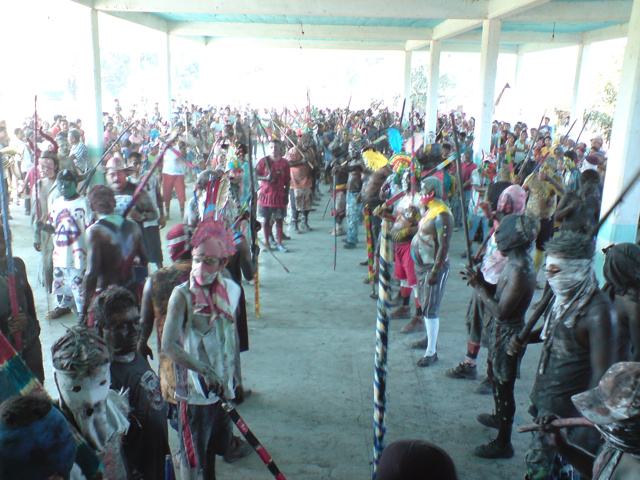 carnaval